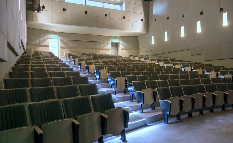 Nuevo Cine Universidad de la UNCUYO, ubicado en la Nave Universitaria, Parque Central.